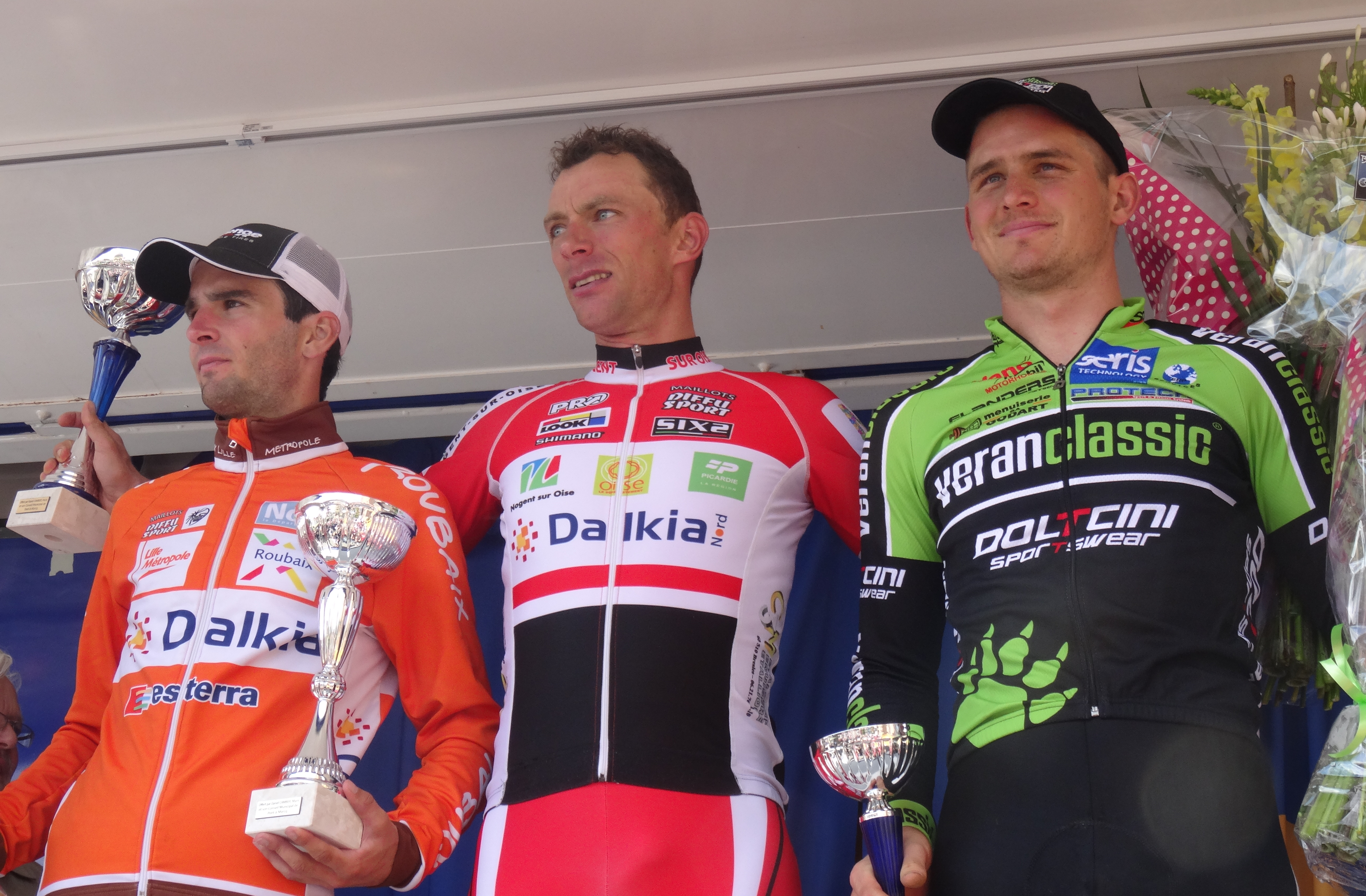 Reportage photographique réalisé le dimanche 13 juillet à l'occasion du départ et de l'arrivée de la Ronde pévéloise 2014 à Pont-à-Marcq, Nord-Pas-de-Calais, France.